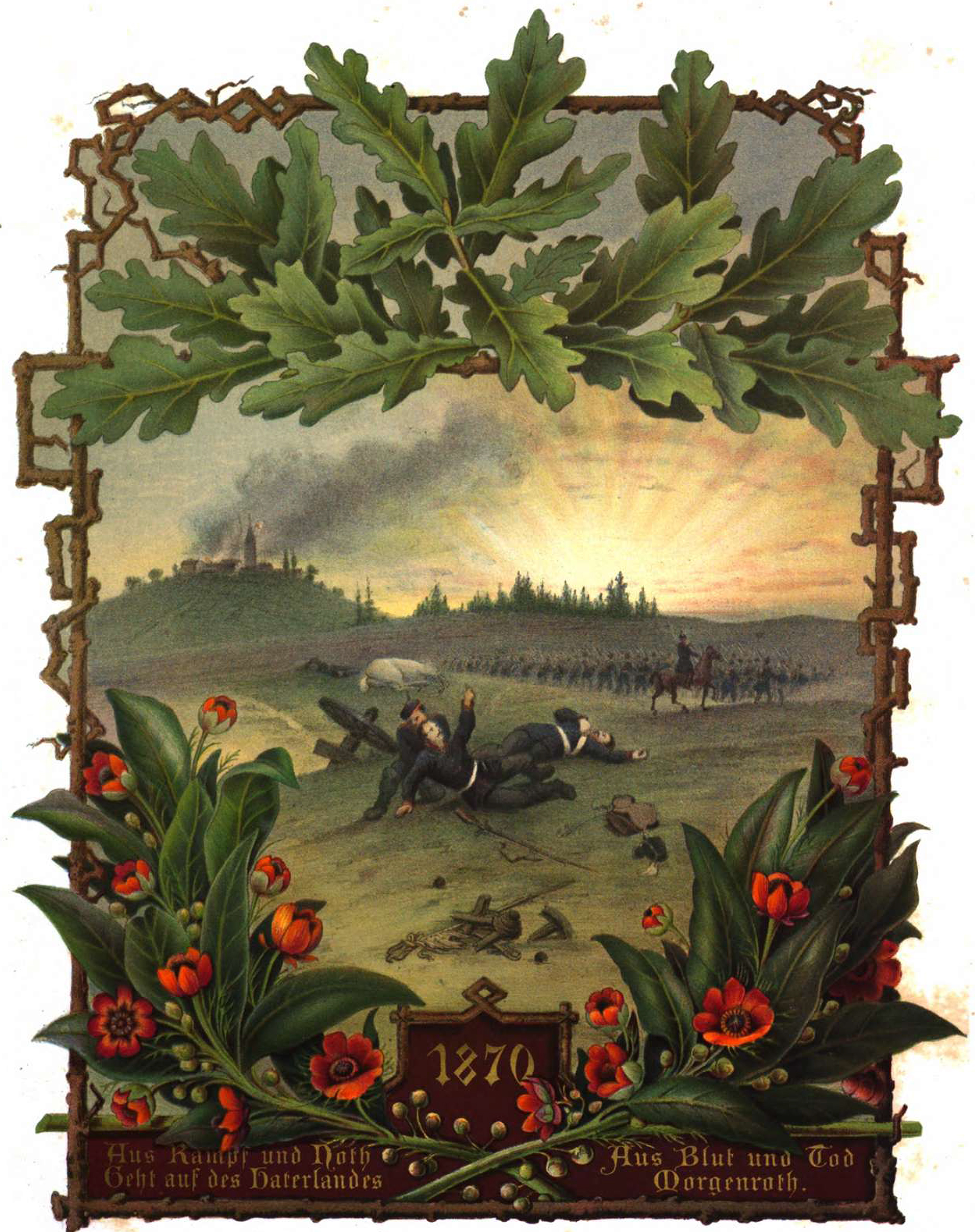 Aus Kampf und Noth, Hermine Stilke, 1870, in "Deutsches Künstler-Album mit Beiträgen lebender Künstler und Dichter", Düsseldorf 1871, S. 28